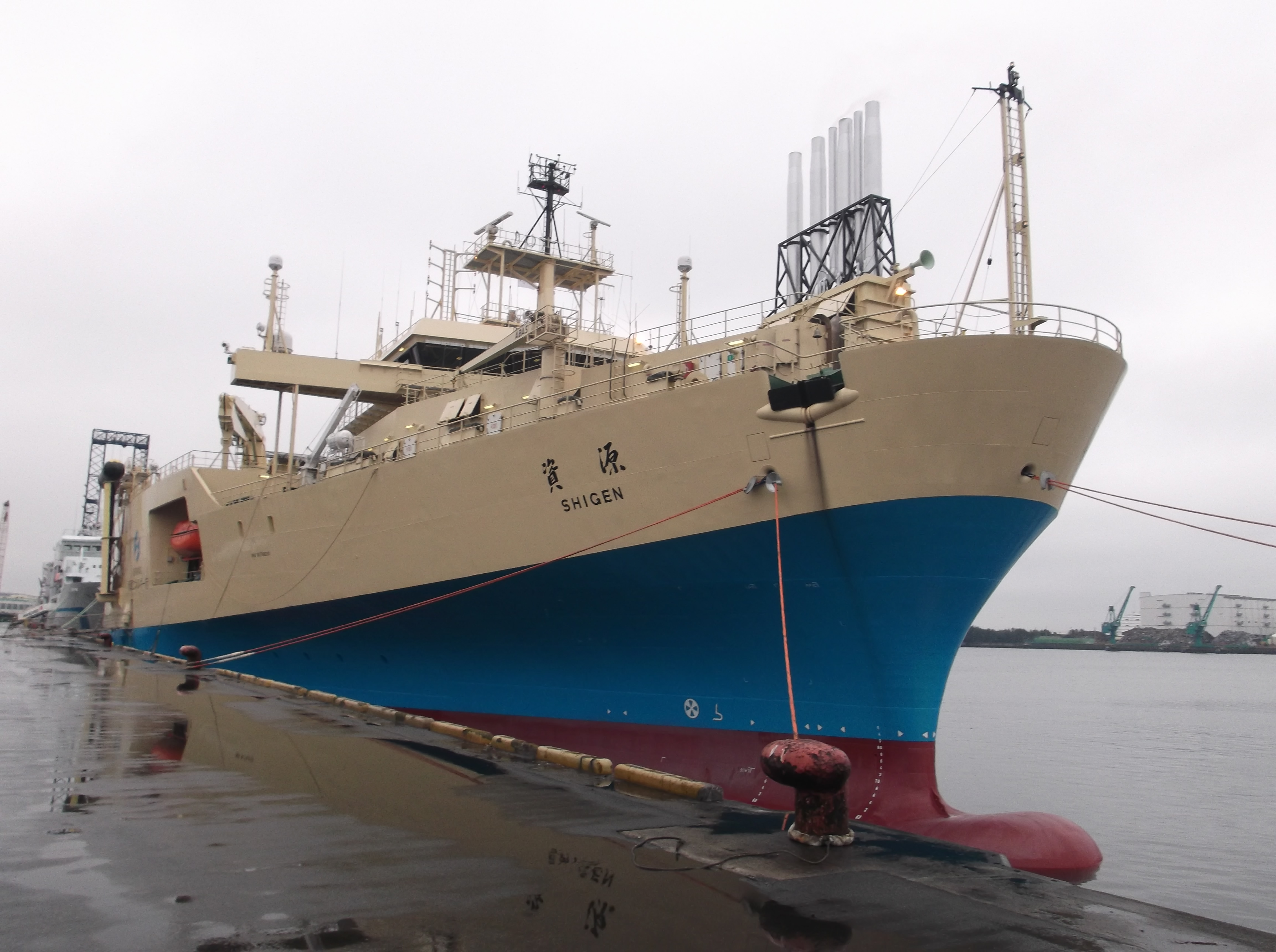 独立行政法人石油夕天然ガス・金属鉱物資源機構の調査船資源（しげん）、千葉県船橋市の船橋港で撮影